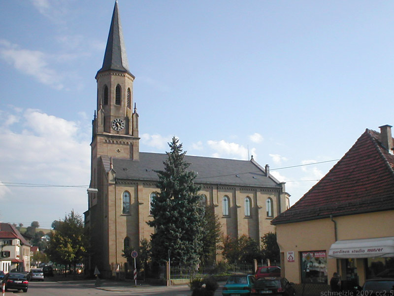 Evang. Pfarrkirche in Meckesheim, Baden-Württemberg, Deutschland